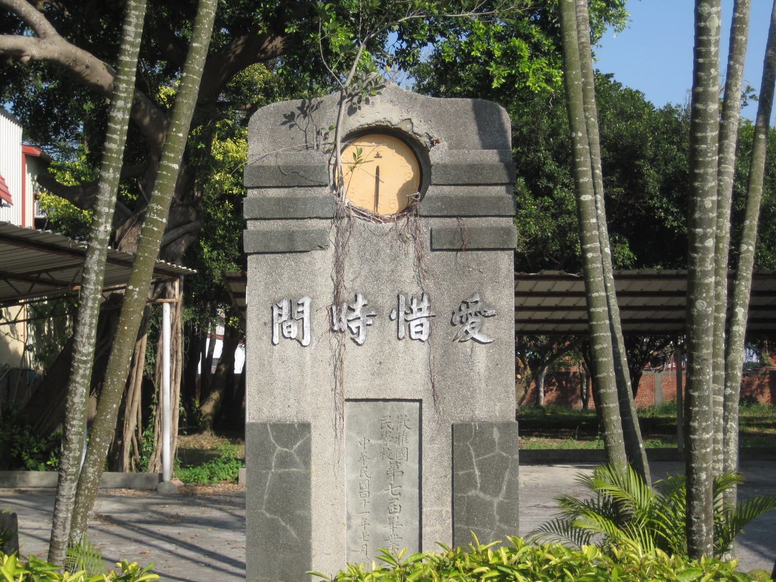 鹽水歡雅國小時鐘座。